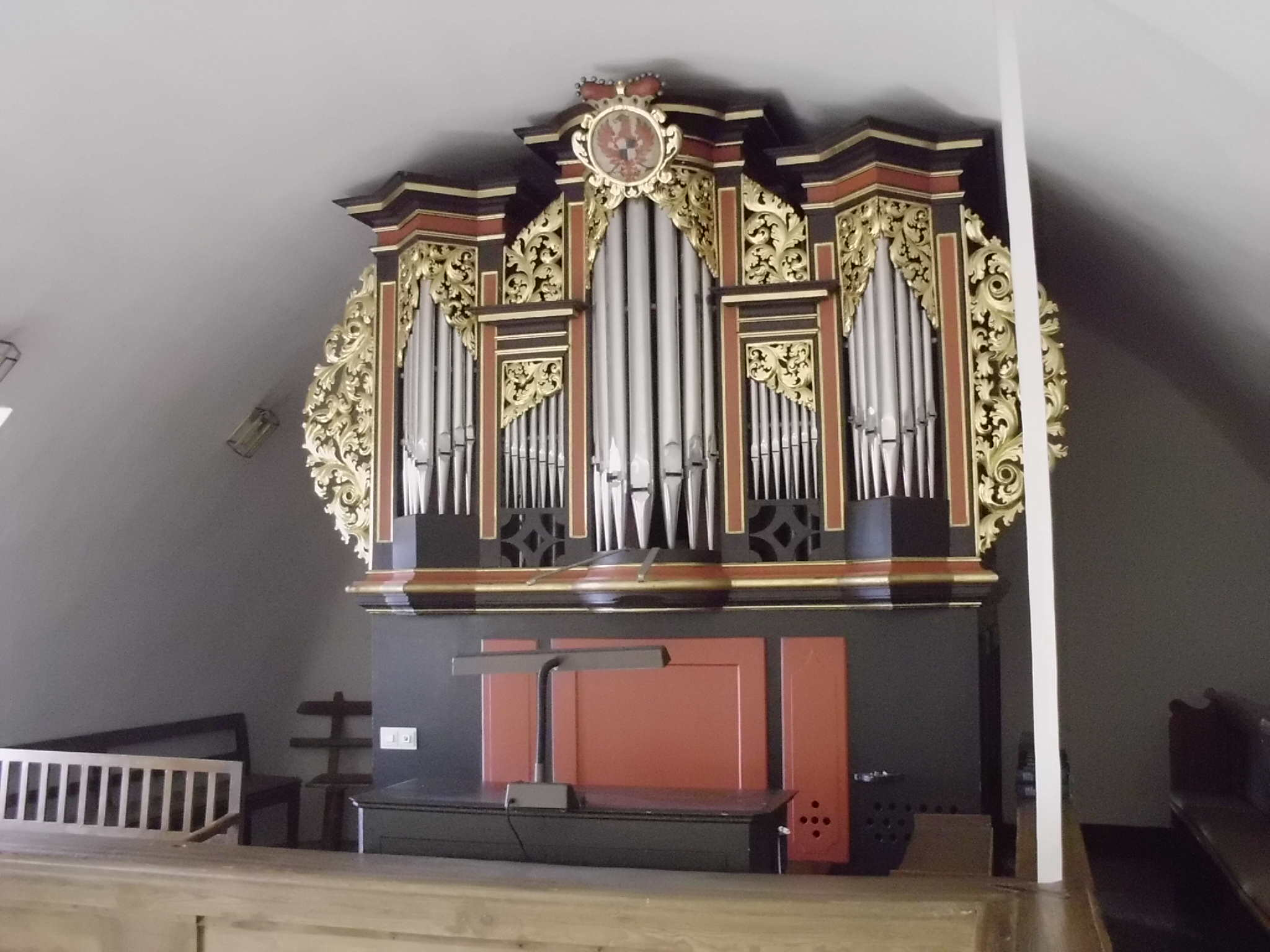 Evang.-Luth. Pfarrkirche St. Michael in Pfofeld im Landkreis Weißenburg-Gunzenhausen, Orgel auf der oberen Westempore